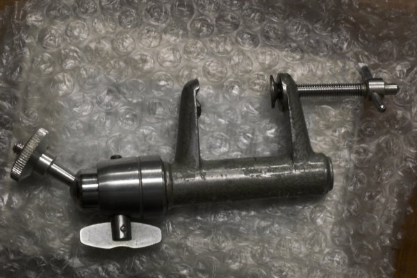 Штатив-струбцина для фототехники